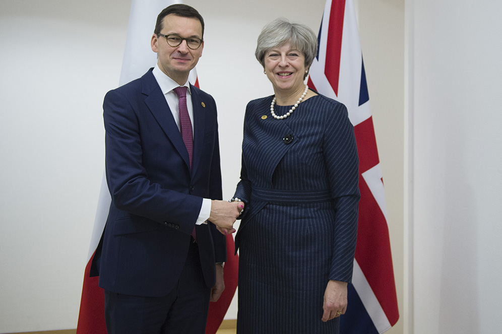 Bruksela, premier Mateusz Morawiecki na posiedzeniu Rady Europejskiej.